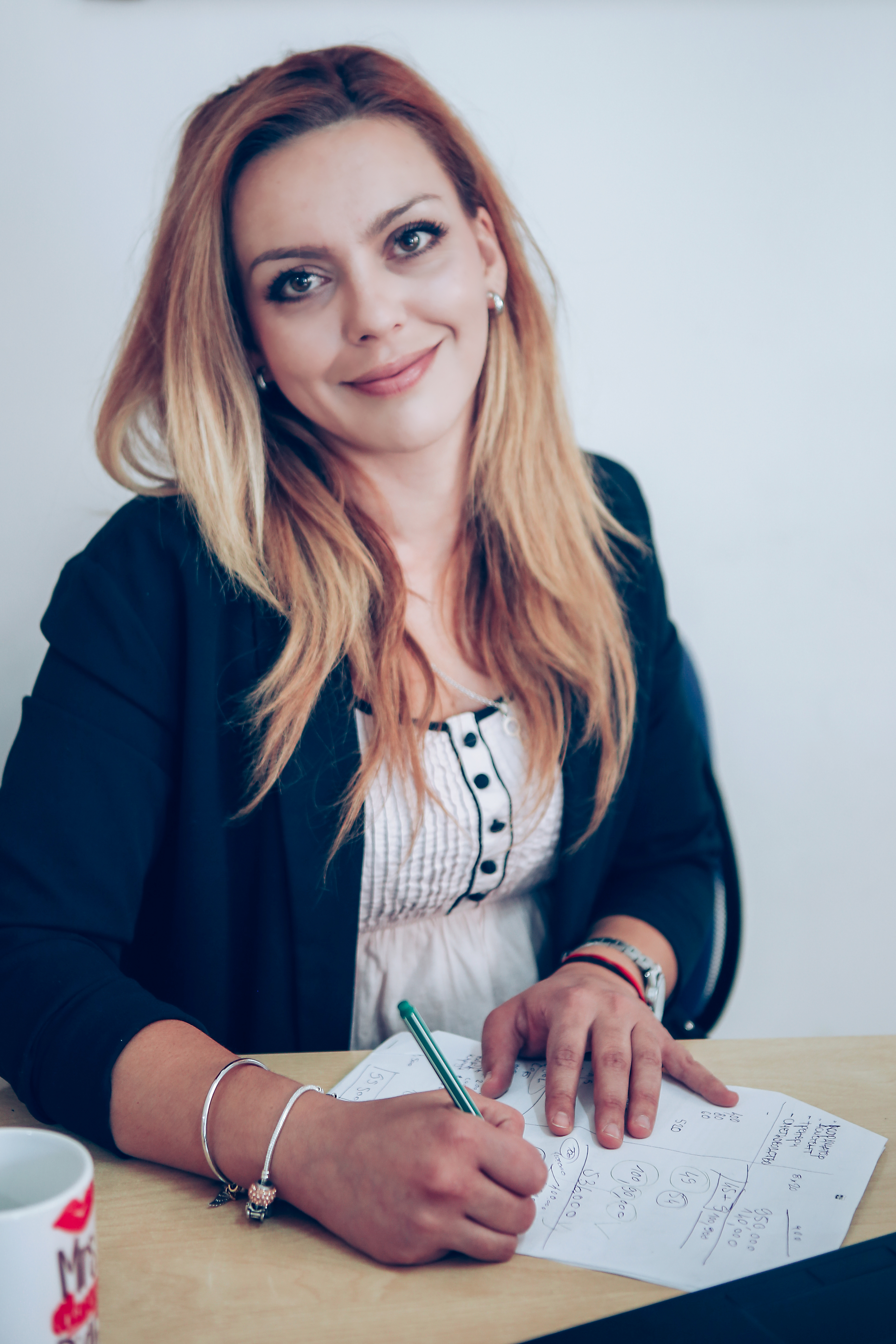 Srpskohrvatski / српскохрватски: Дороти Пачкова